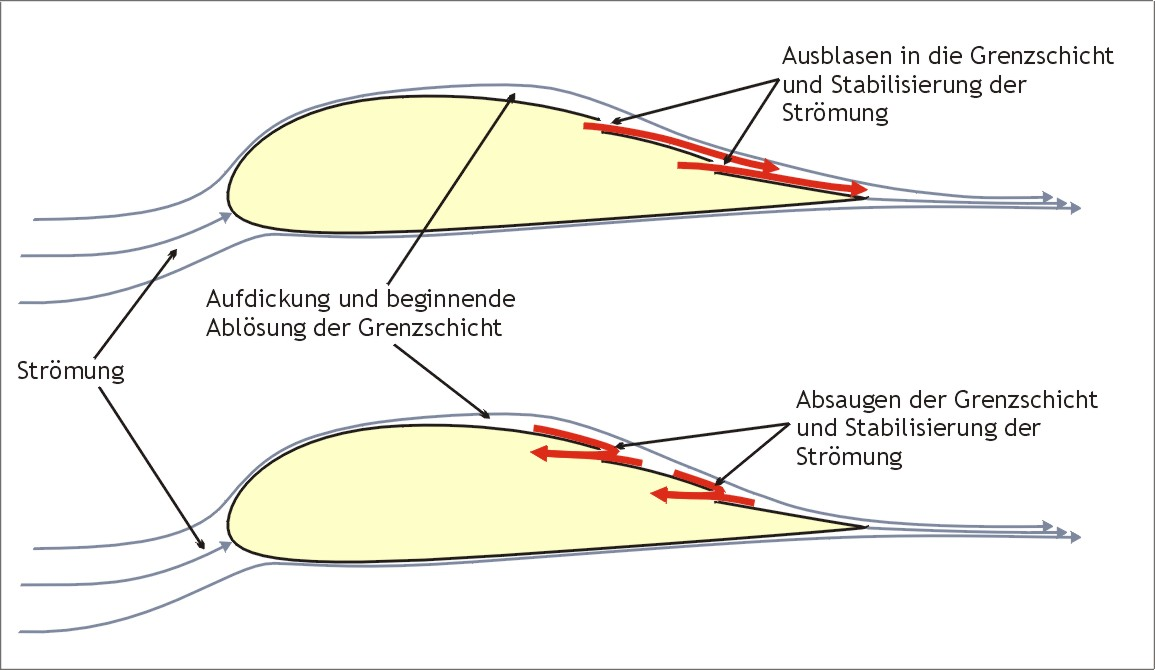 Prinzipdarstellung des Anblasens und Absaugens der Grenzschicht an einem Tragflächenprofil